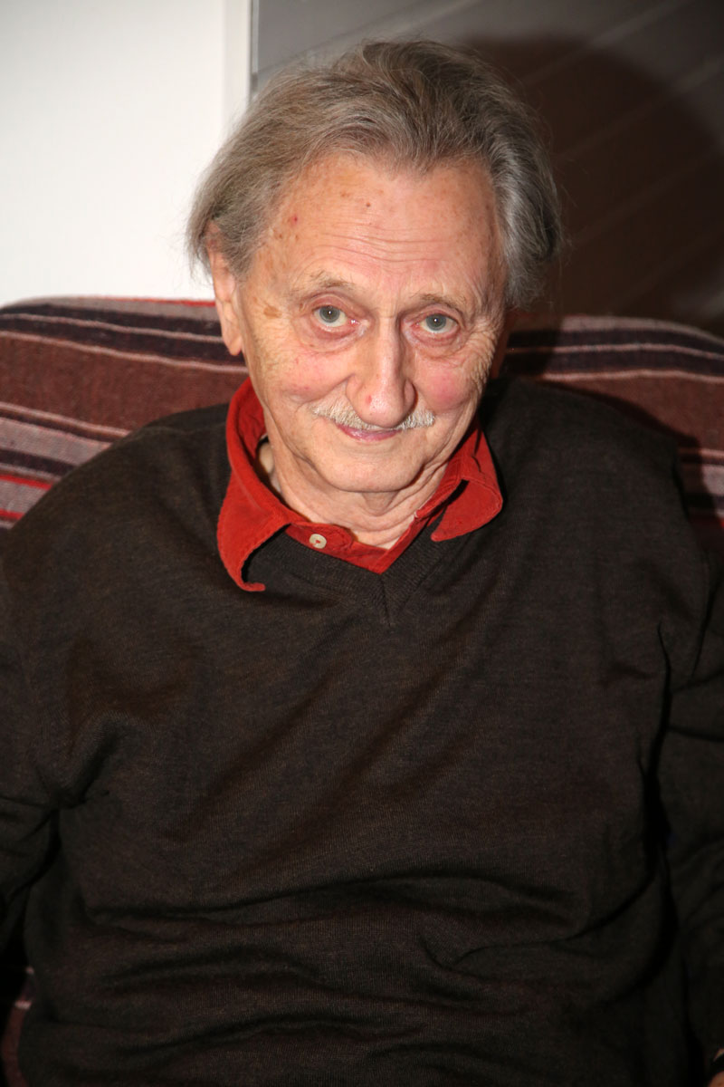 Ferry Radax-2292